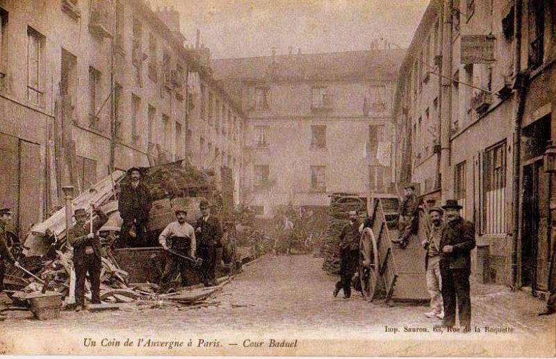 Ferrailleurs auvergnats - Cour Baduel - Paris